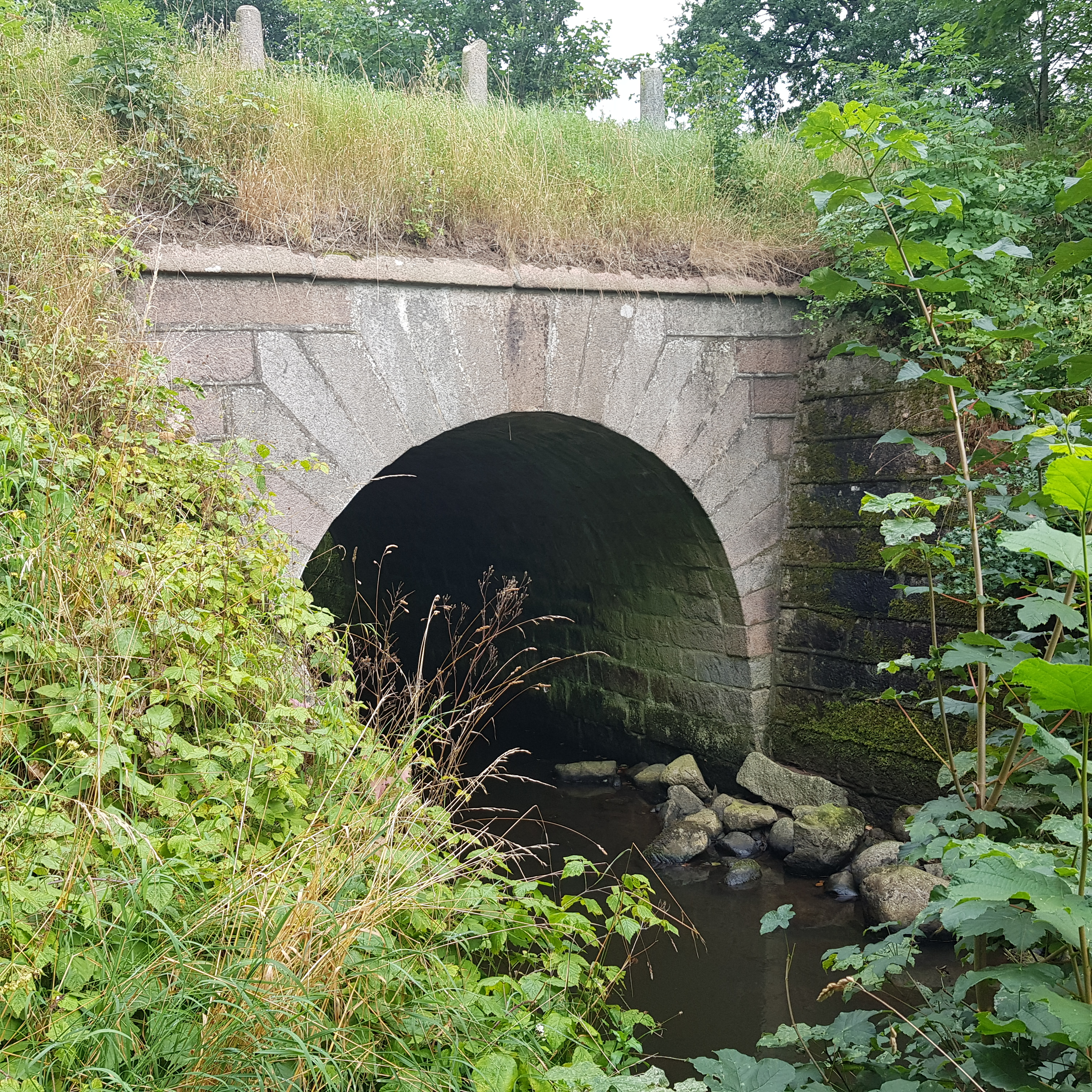 Hesselvad Bro set fra vest